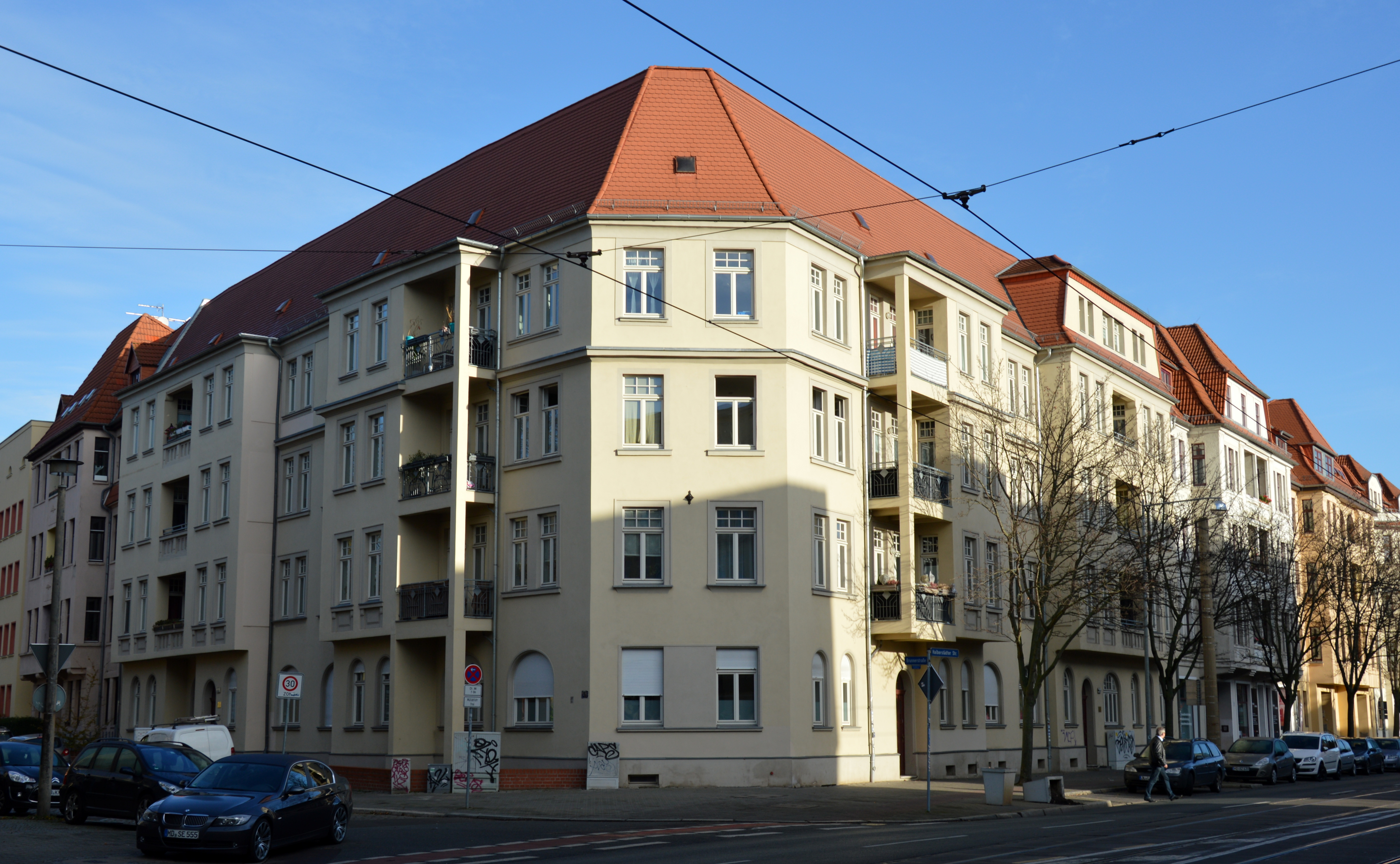 Brunnerstraße 2